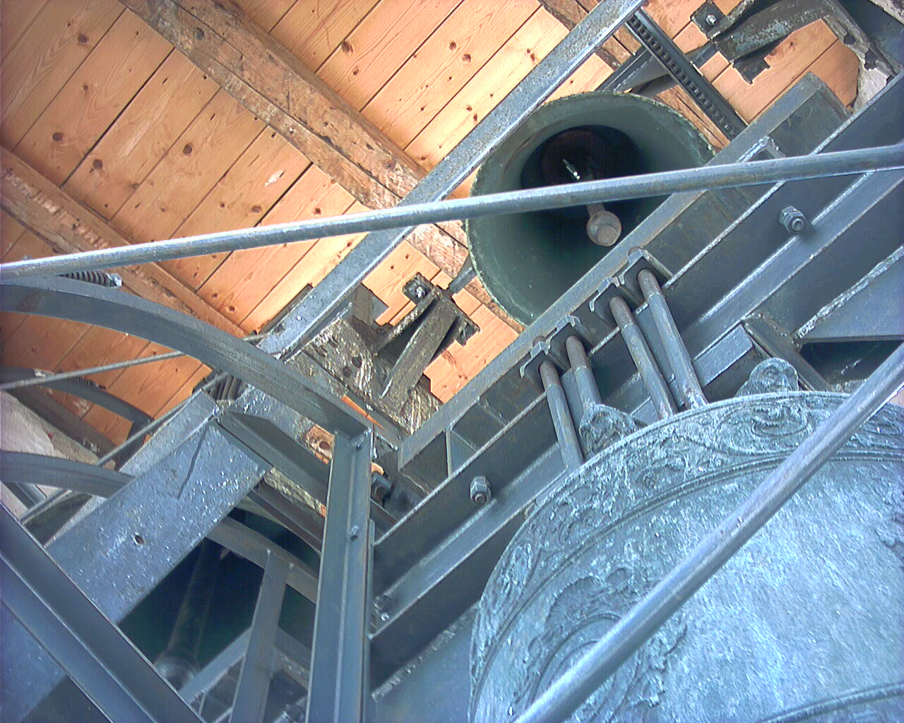 Gardigliano, frazione di Scorzè: castello delle campane del campanile della Chiesa Parrocchiale di San Donato.